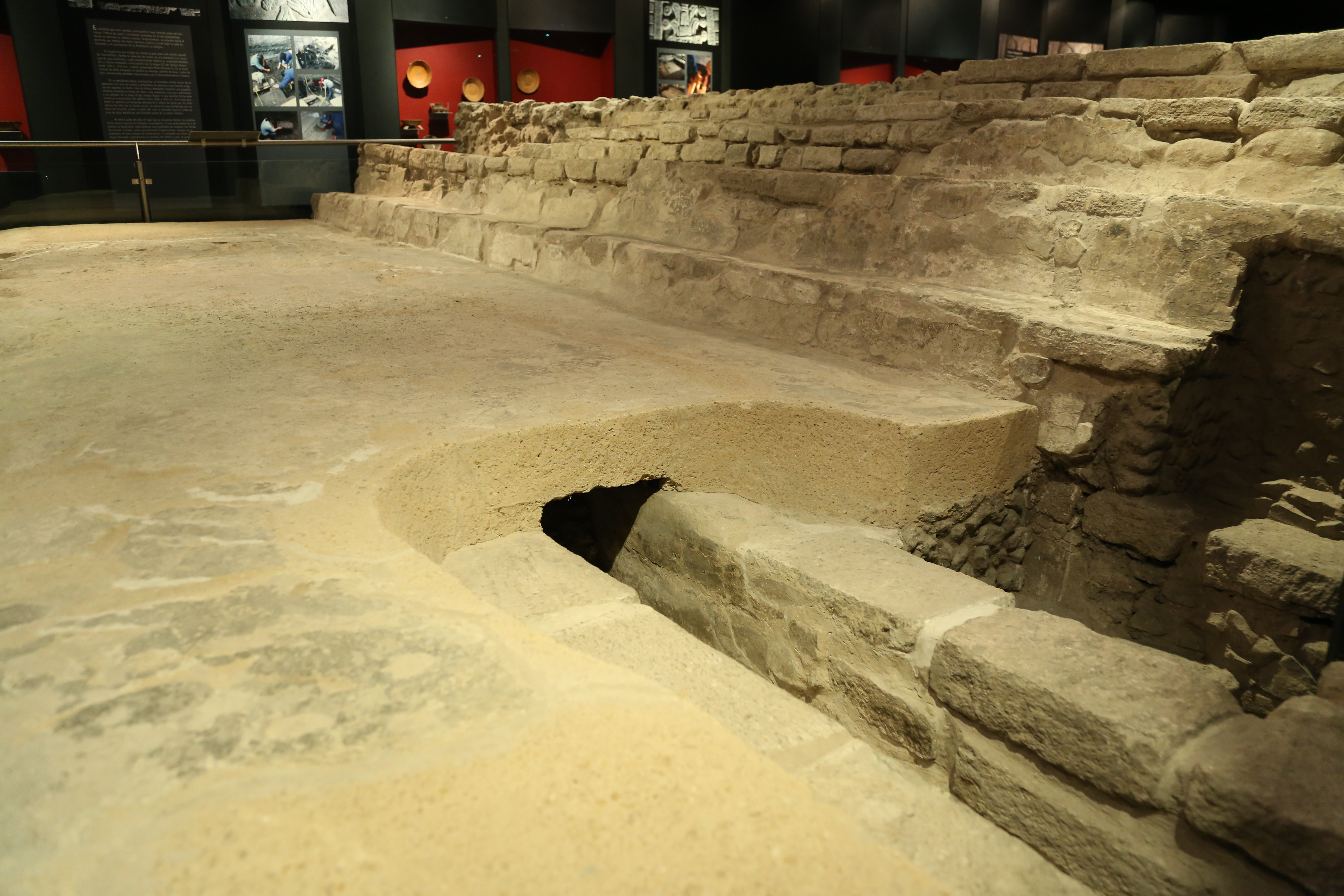 Vestigios de Tenochtitlan